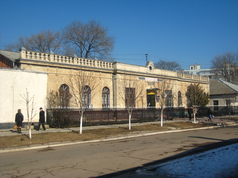 Бывшая еврейская больница